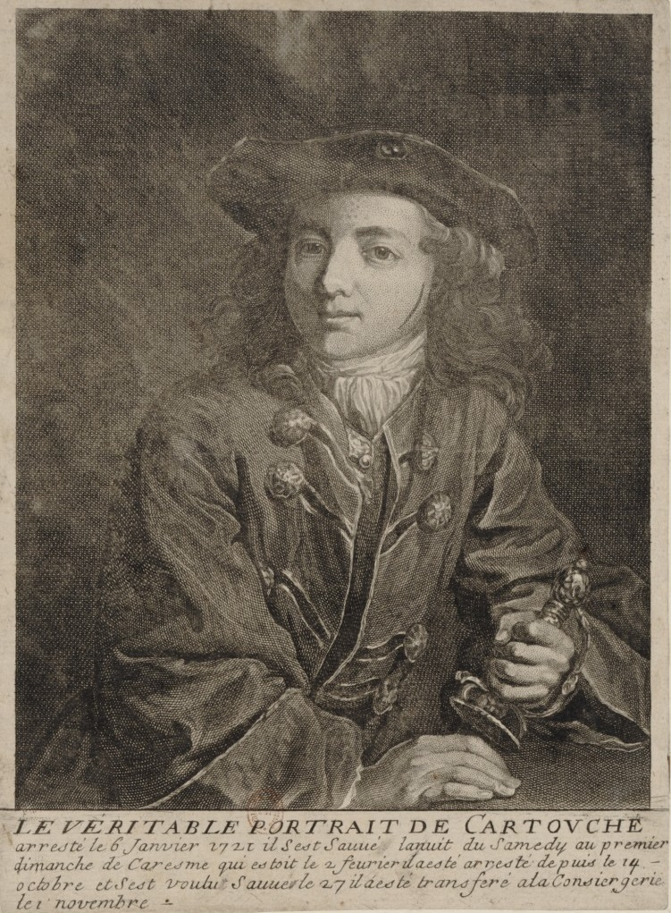 Le véritable portrait de Cartouche